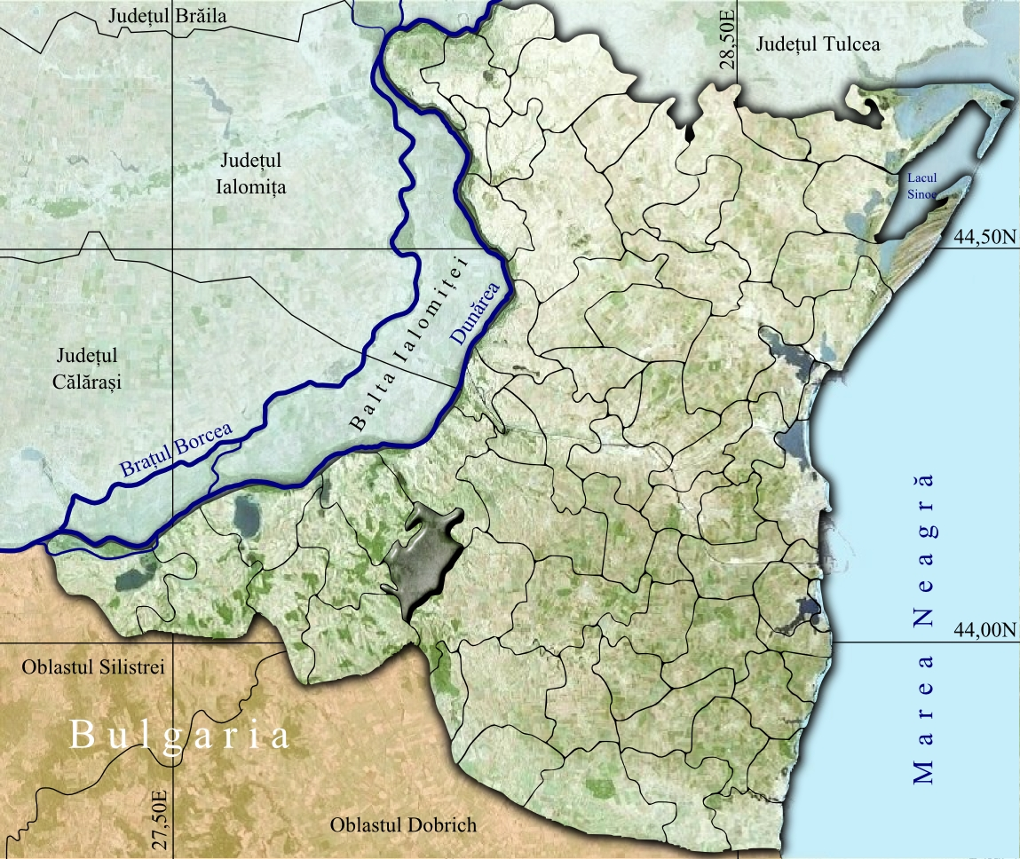 Comuna Adamclisi Constanta